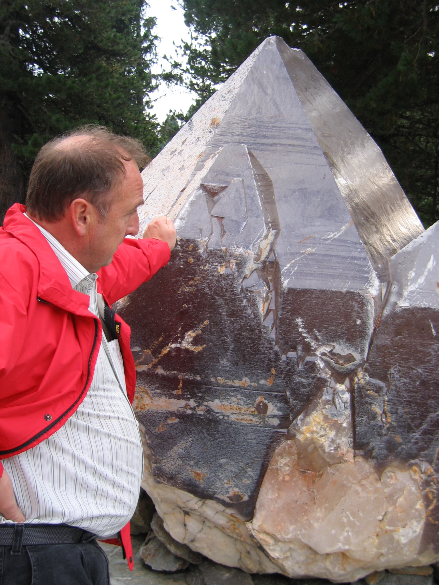 Bergkristall "Heart of Goijas" in der Austellung des Museums Kranzlbinder, Turracher Höhe, Österreich